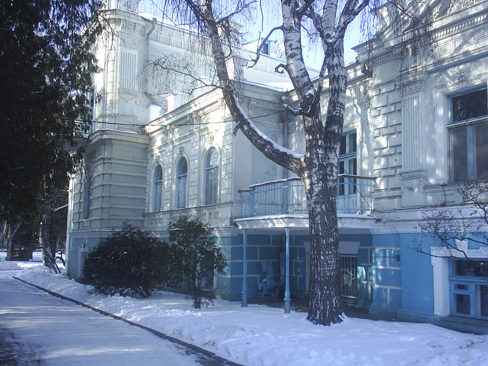 Садиба Асмолова з дендропарком, Суми, вул. Лучанська, 14